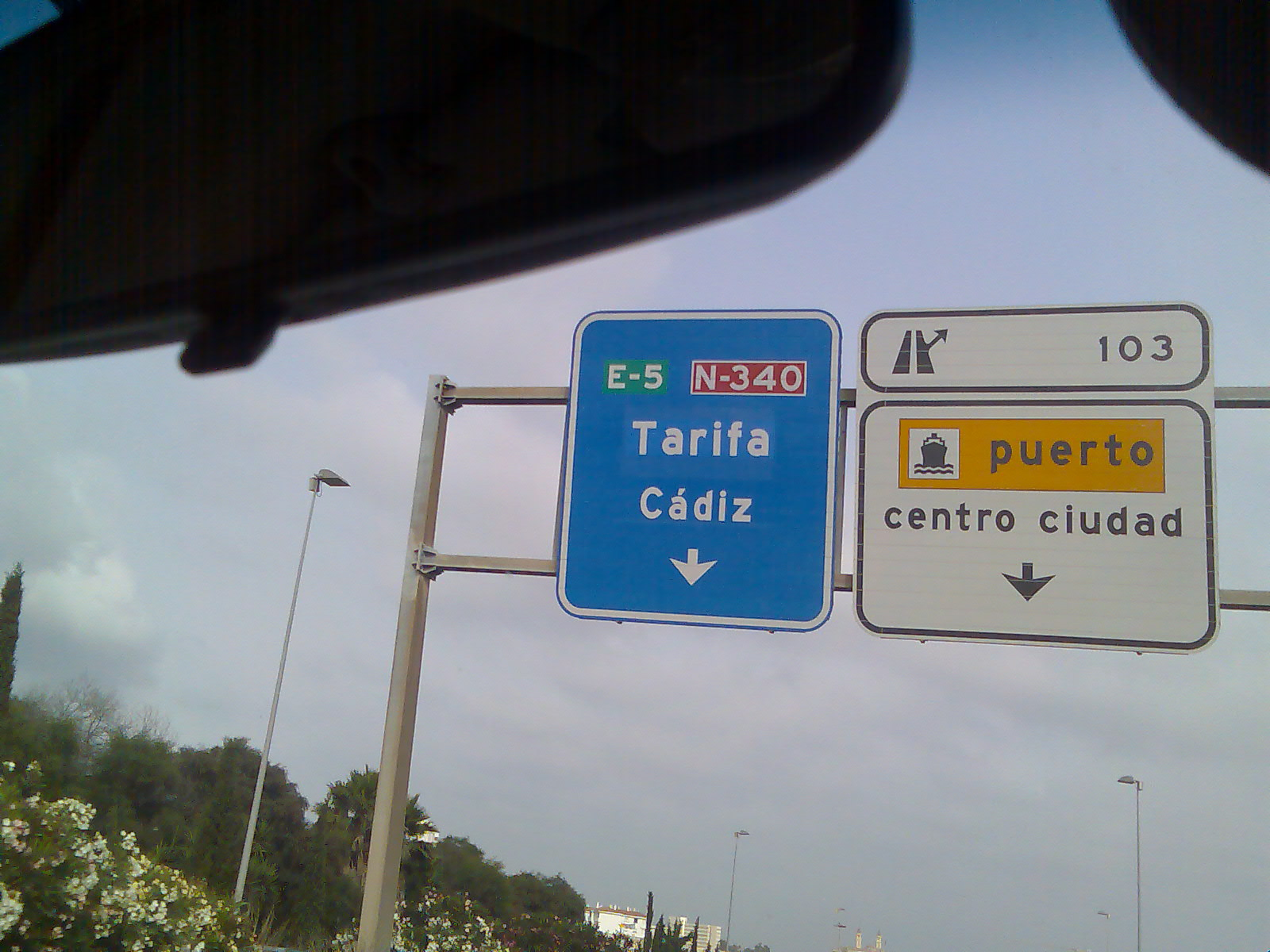 Letrero de la N-340 a su inicio en Algeciras